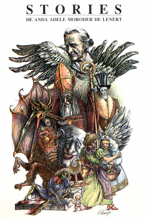 Geschichten in Ladinisch der Adele Moroder Lenert